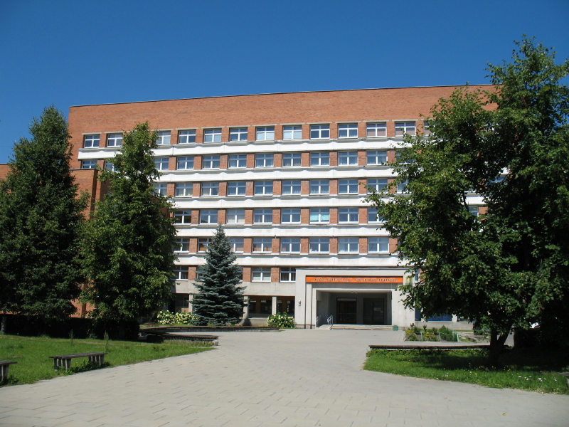 Kalniečių poliklinika, Kaunas.